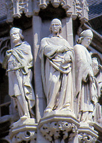 Photo (Dia) des évêques Francon, Rathère et Wazon de Liège